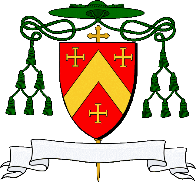 En gwad e gebrenn en aour heuliet gant teir groaz krouget ivez en aour